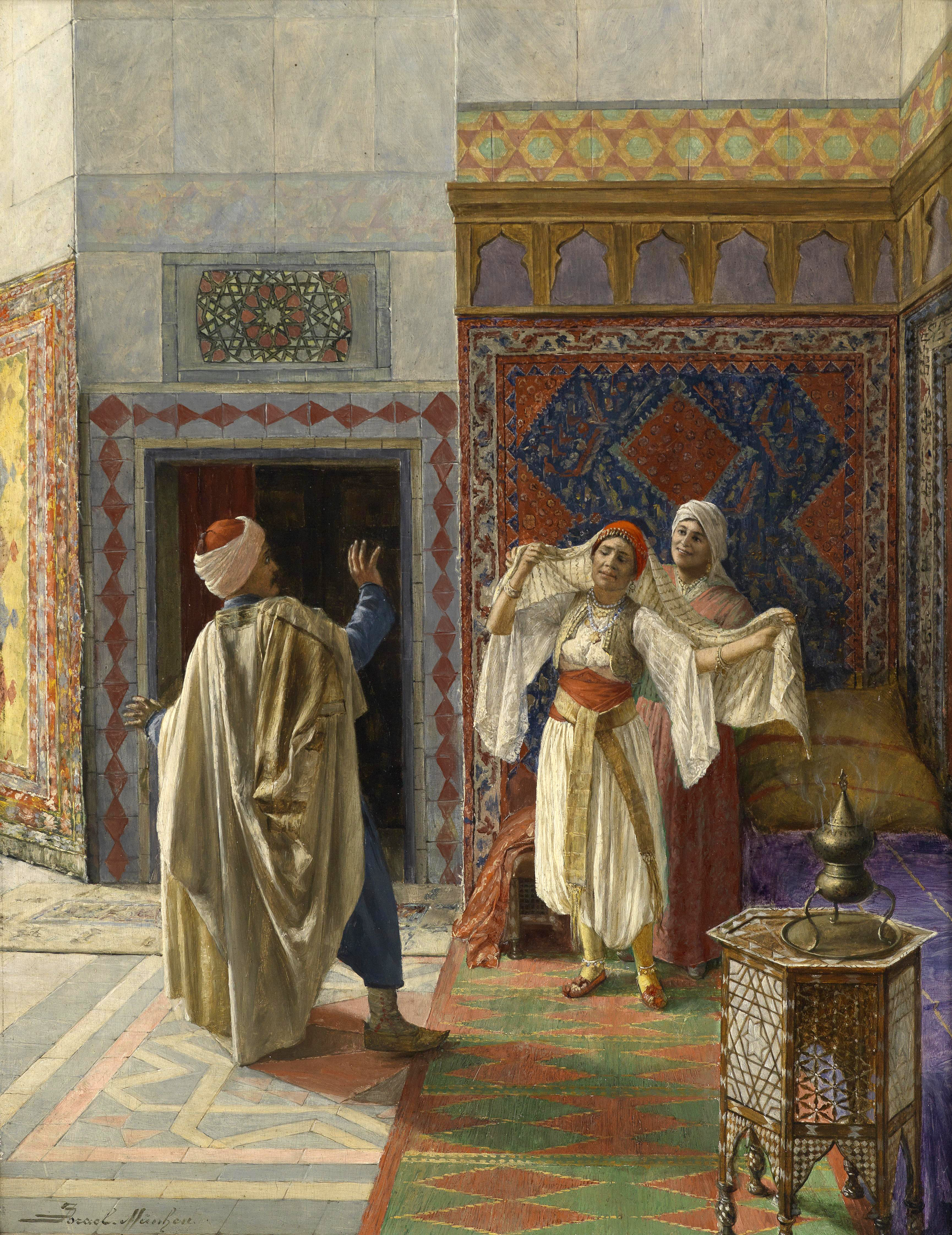 Überrascht